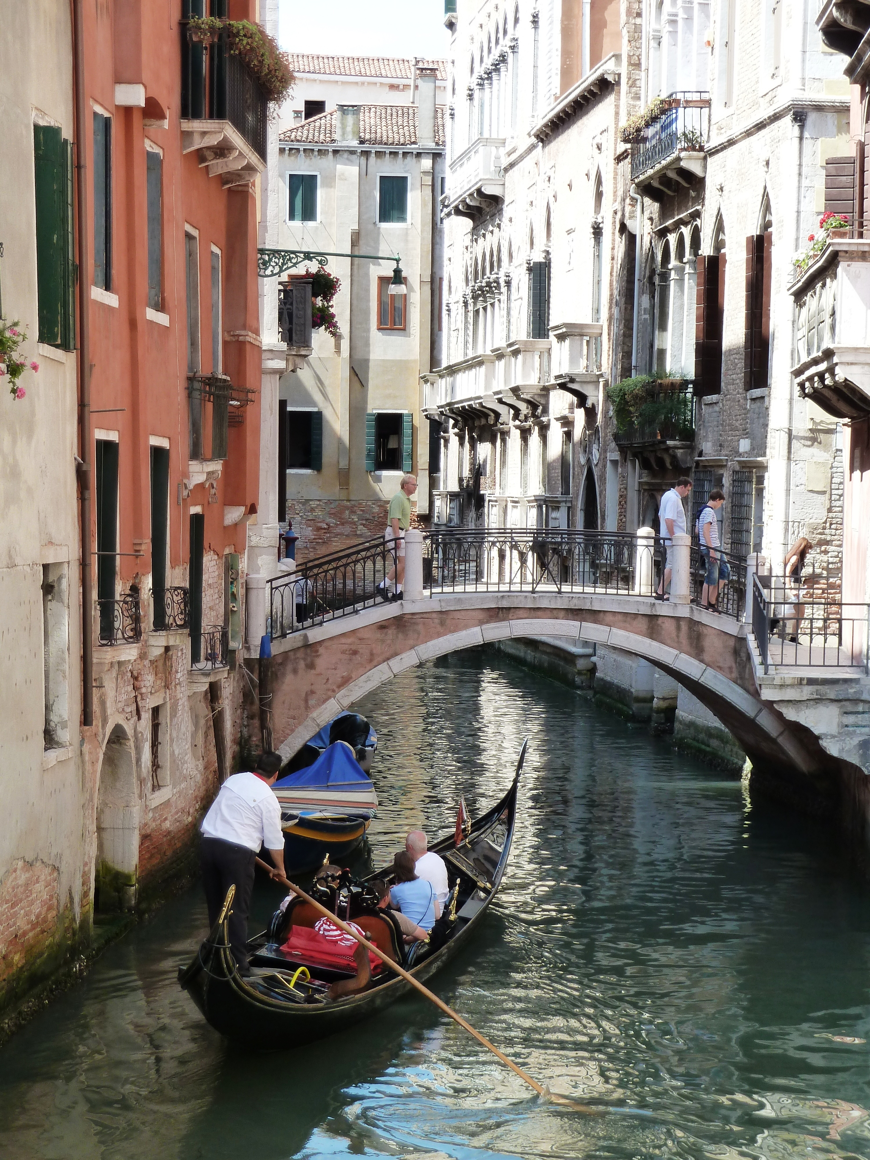 Ponte dei Barcaroli o del Cuoridoro (Venice)